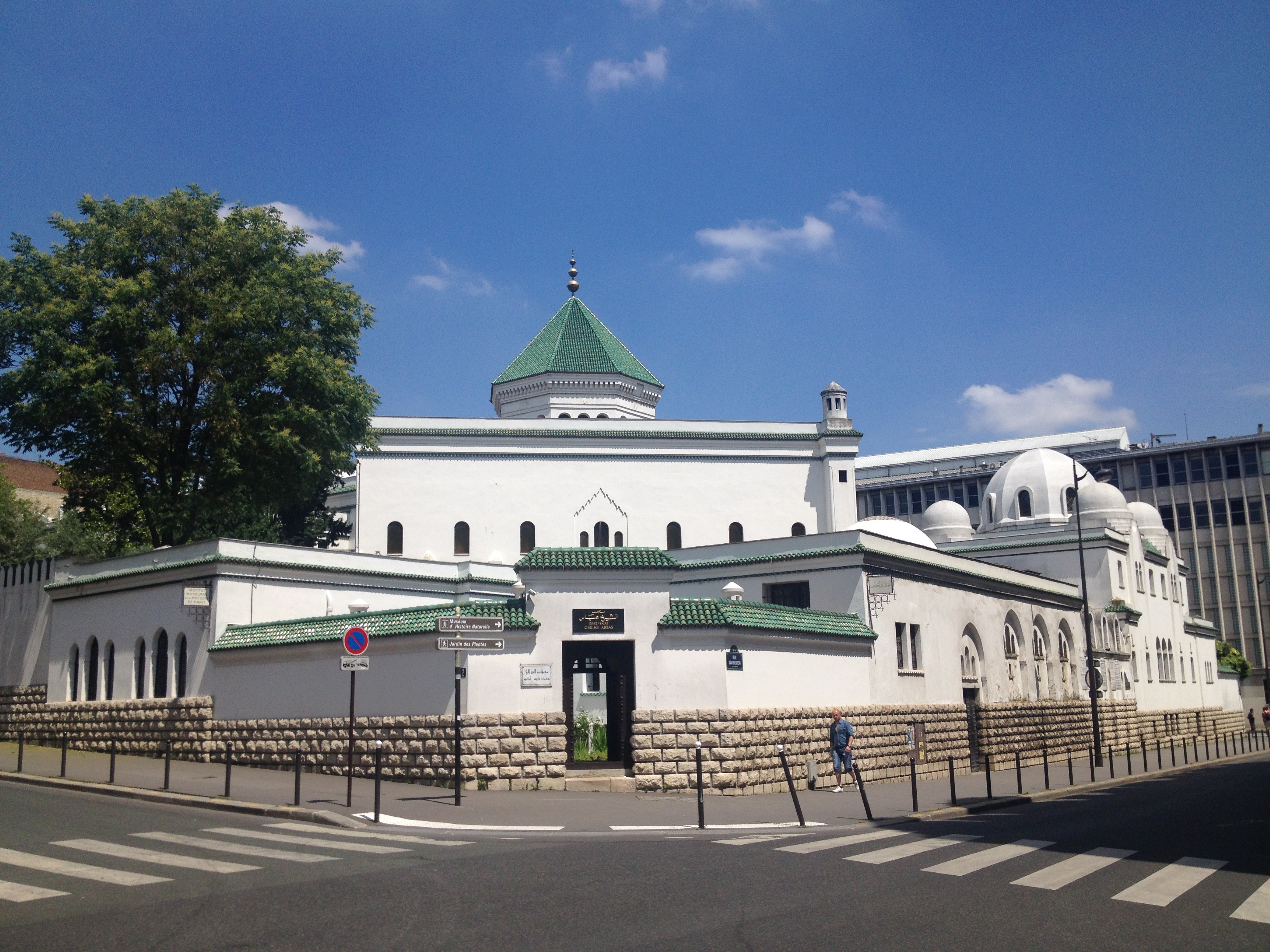 Mosquée de Paris.